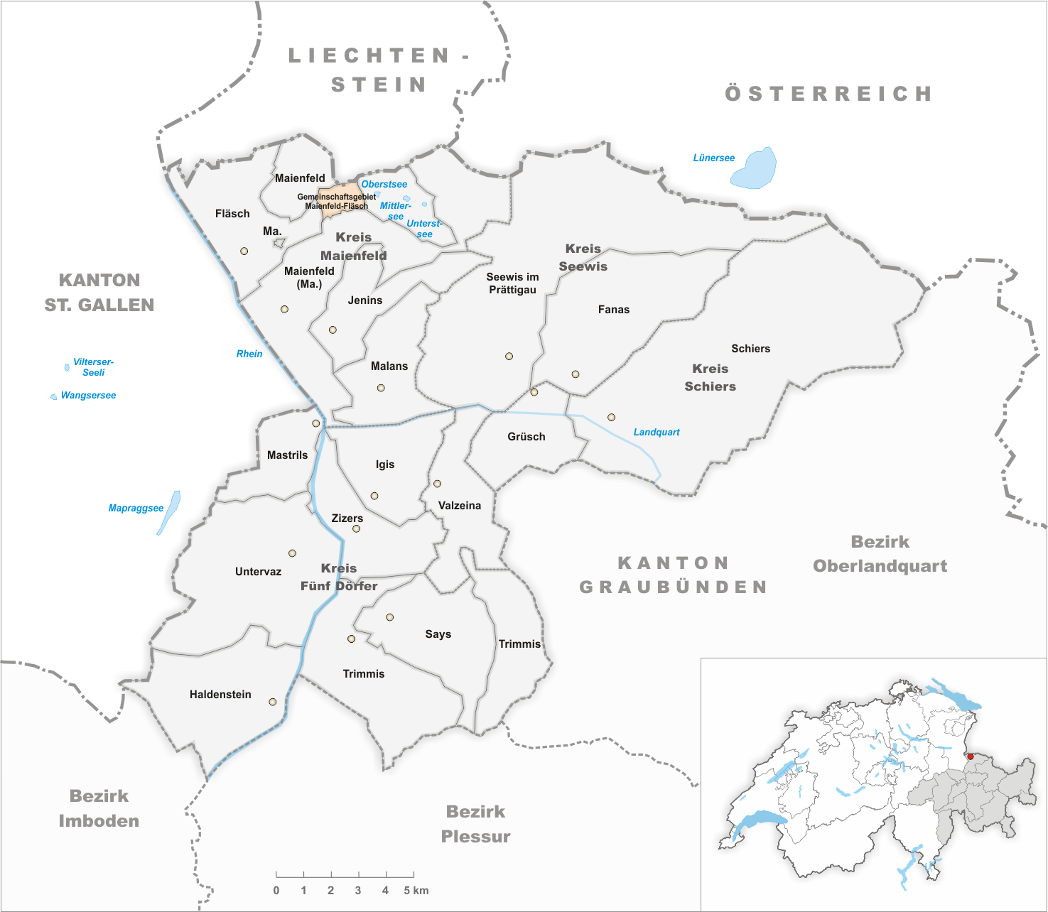 Gemeinschaftsgebiet_Maienfeld-Fläsch Artist: Tschubby